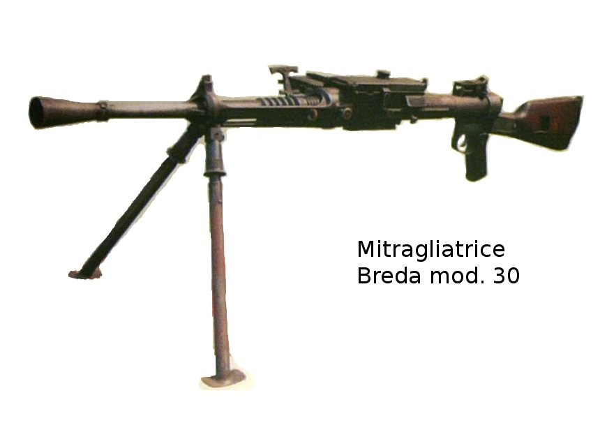 Mitragliatrice Breda Mod. 30